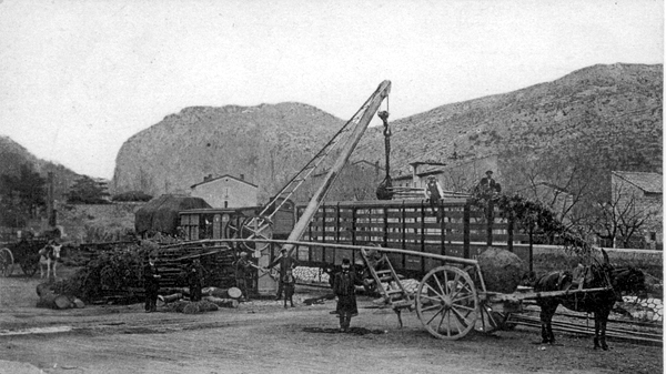 Chargement de mottes de bambous géants à la gare d'Anduze en 1905.